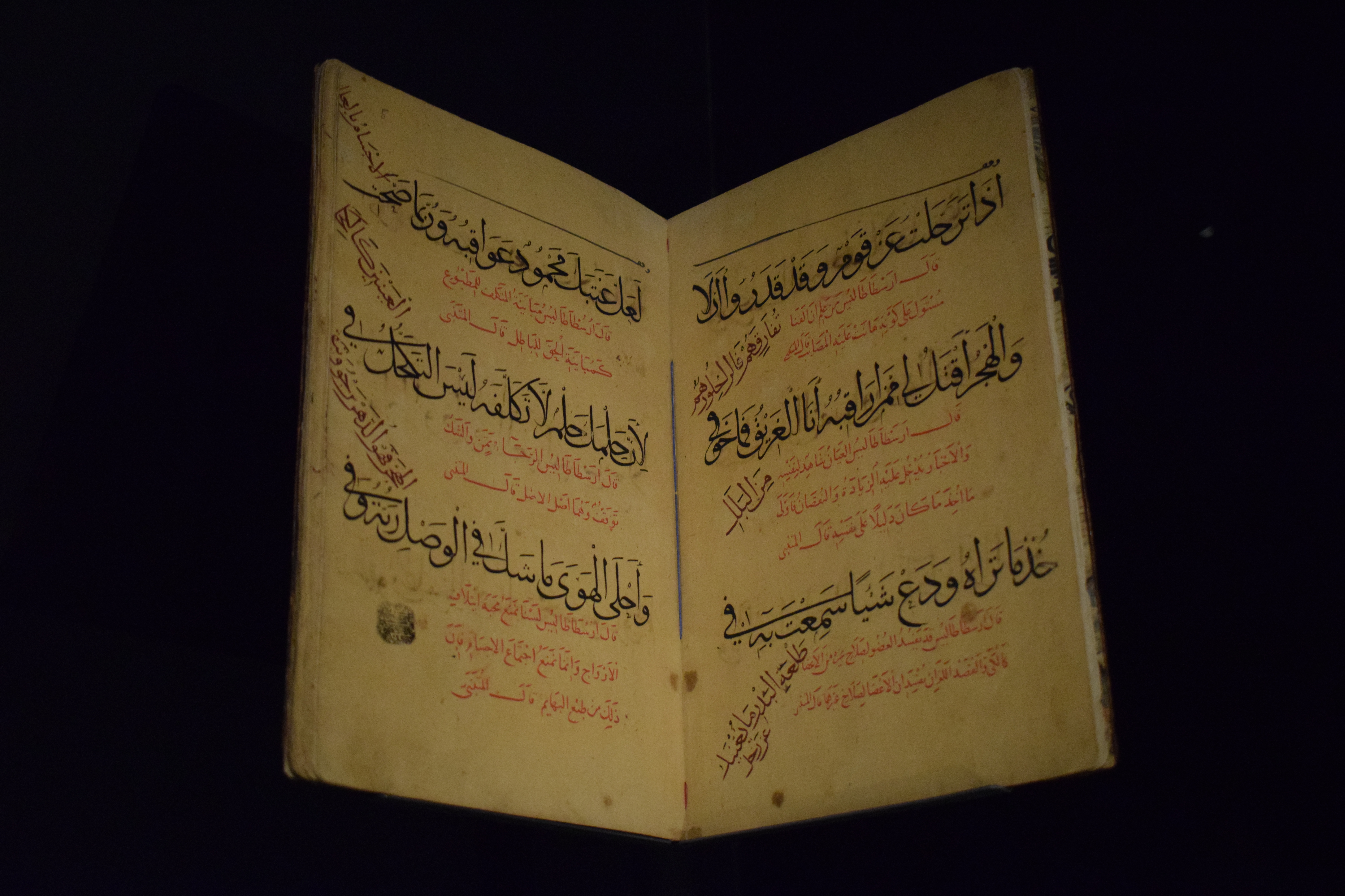 Al-Hatimi († 988). « Alrisala al-hatimiyya ». Manuscrit arabe sur papier, XIIIe siècle. Selon la légende de la Fondation Martin Bodmer où le livre est exposé, « voulant humilier la morgue du célèbre auteur al-Mutanabbi (915-963), ce poète de cour [critique littéraire et philologue vivant à Bagdad, Abū 'Alī Muḥammad ibn al-Ḥasan al-Ḥātimī] isola [environ] cent extraits des poèmes de son rival (en noir) et mit en parallèle des citations d'Aristote (en rouge), prouvant ainsi un pillage manifeste et sans vergogne des idées du philosophe grec ».